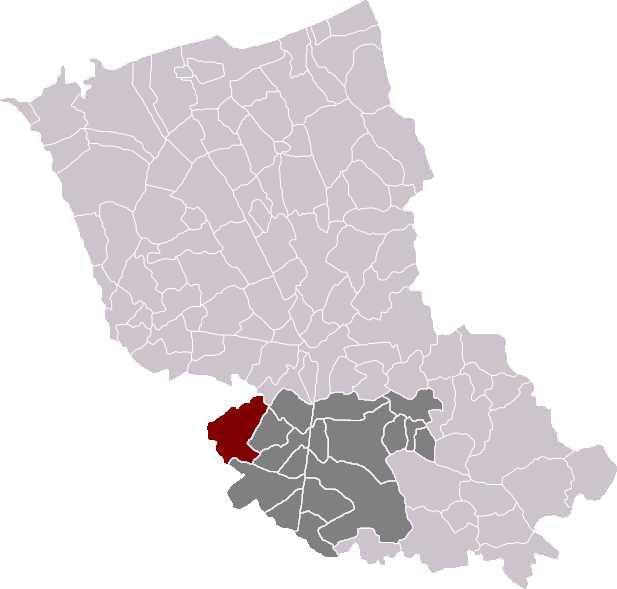 Locatie gemeente Ruisscheure in arrondissement Duinkerke. Zelfgemaakt. Location of Renescure municipality in the arrondissement of Dunkirk. Self made. Localisation de la commune de Renescure dans l'arrondissement de Dunkerque. Fait moi-même.